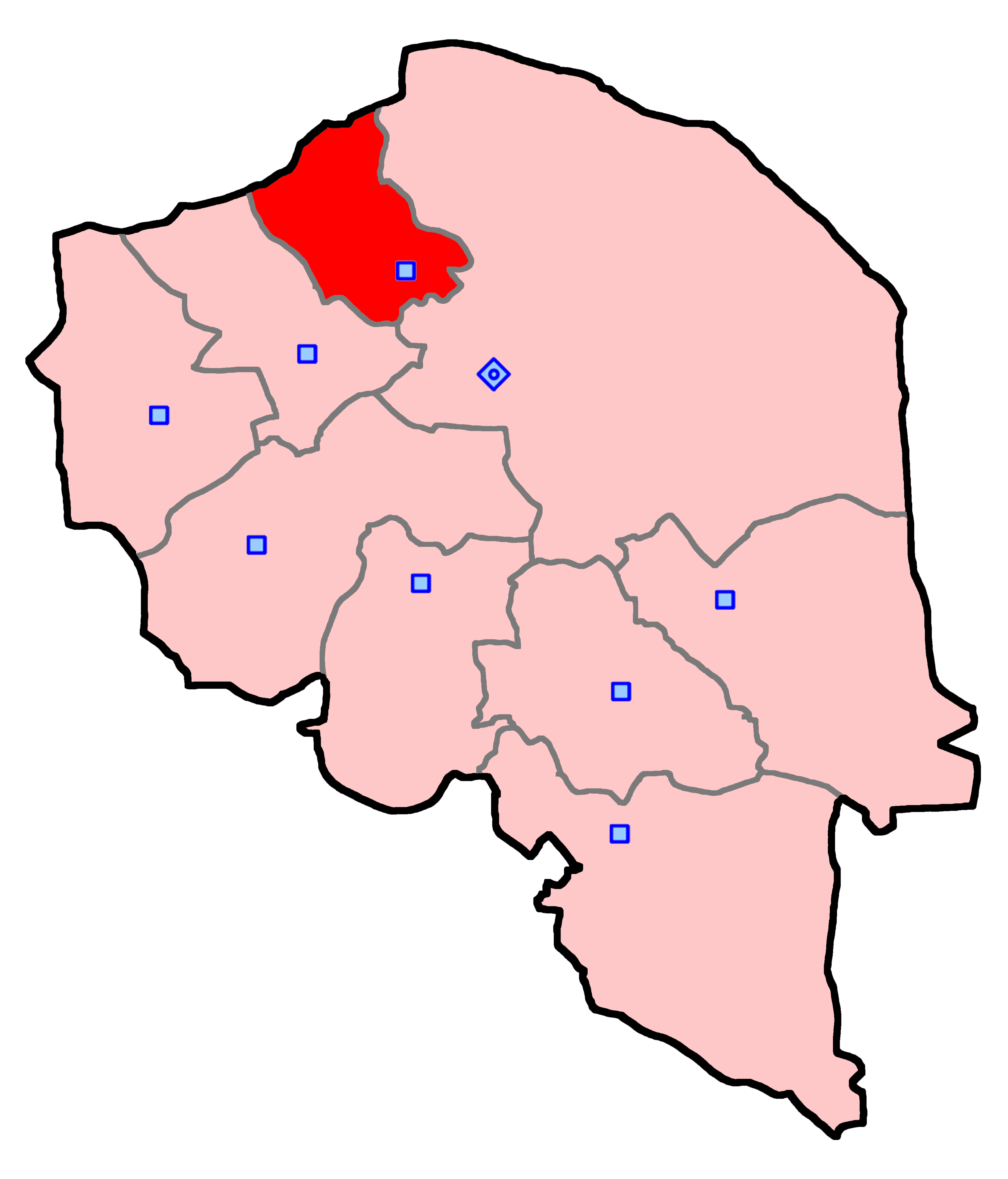 زرند و کوهبنان برای انتخابات مجلس شورای اسلامی